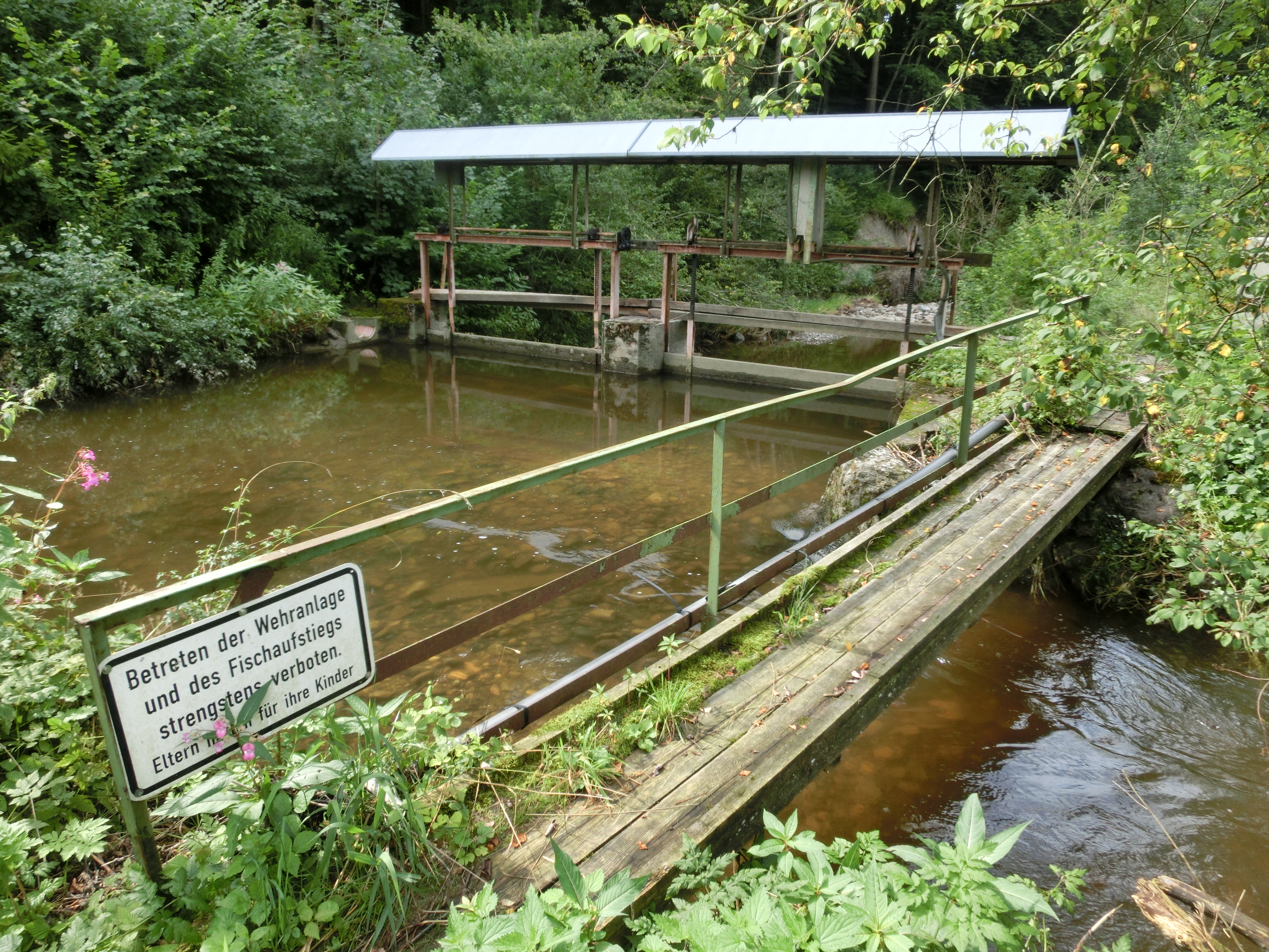 Deutschland - Baden-Württemberg - Tettnang - Laimnau: Wehr am Bollenbach